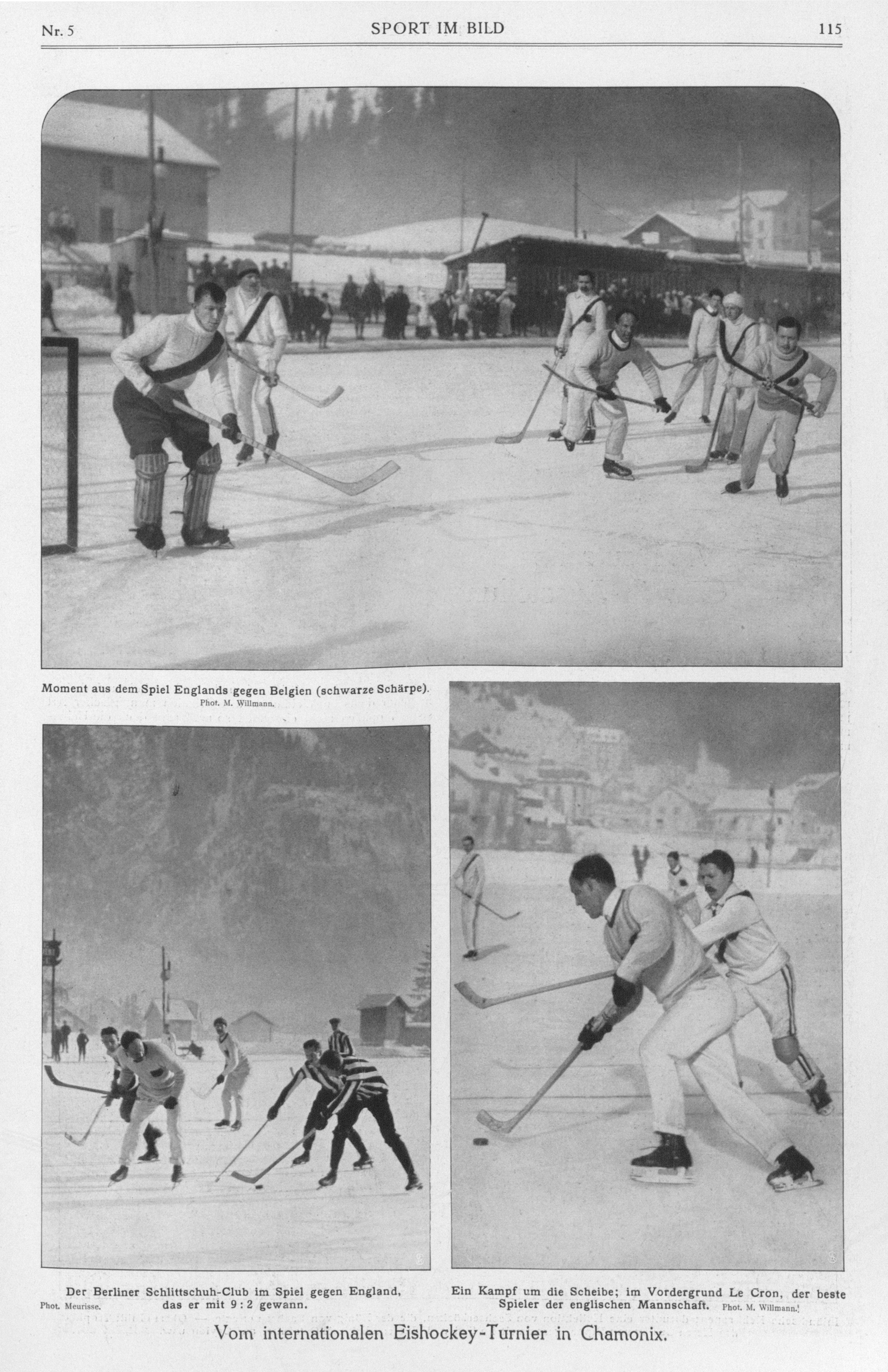 SPORT IM BILD, 1911, Nr. 5, S. 115 Vom internationalen Eishockey-Turnier in Chamonix. Der Berliner Schlittschuh-Club im Spiel gegen England, das er mit 9:2 gewann. Photo: Meurisse. Ein Kampf um die Scheibe; im Vordergrund Le Cron, der beste Spieler der englischen Mannschaft. Photo: M. Williams